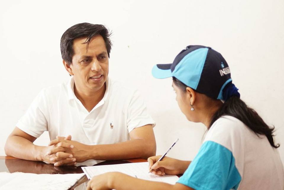 CENSOS 2017 INSTRUMENTO CLAVE PARA PLANIFICAR EL DESARROLLO DE LORETO